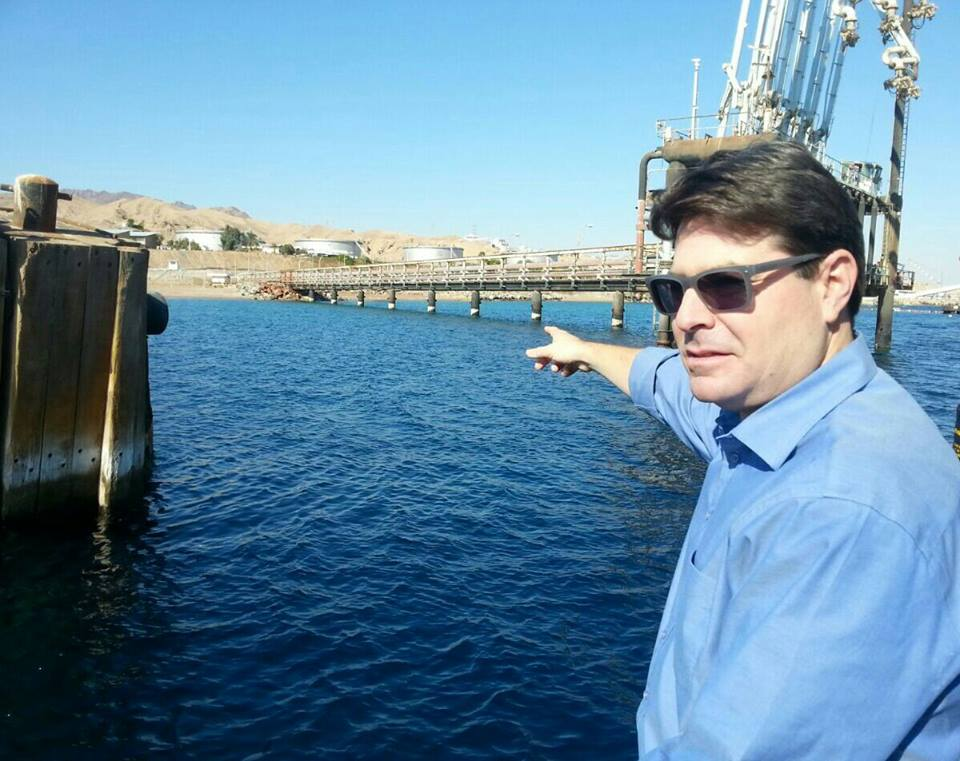 סגן השר להגנת הסביבה אופיר אקוניס, בסיור בחוף קצא"א באילת